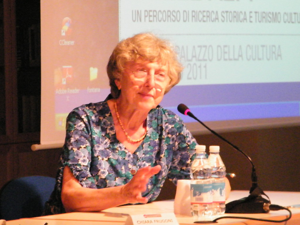 Chiara Frugoni. Palazzo della Cultura, Breno.